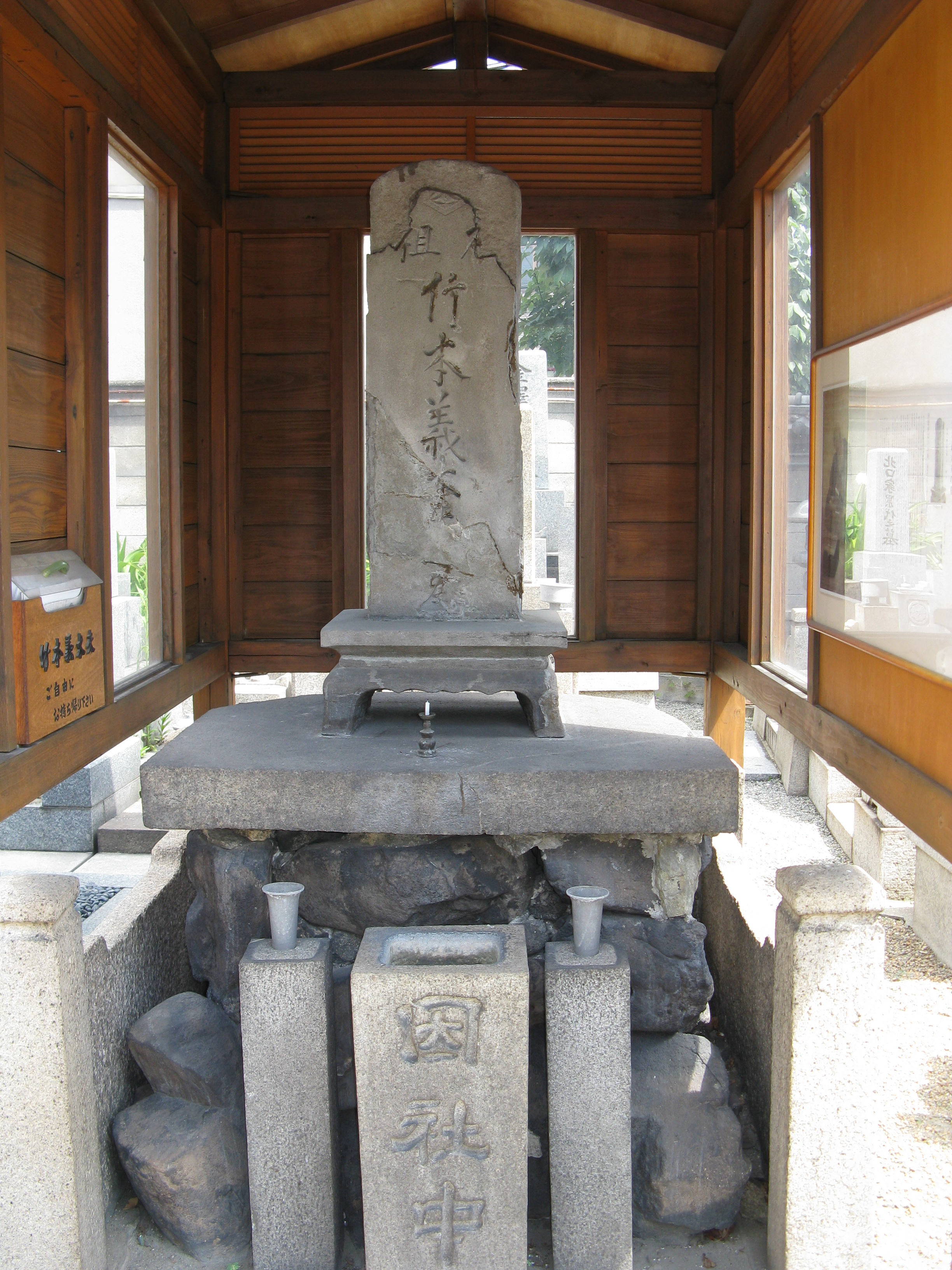 超願寺 竹本義太夫墓